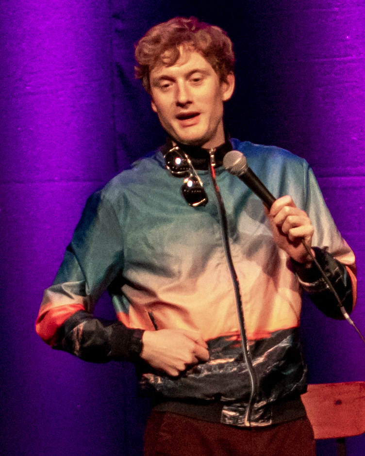 AcasterVaud011118